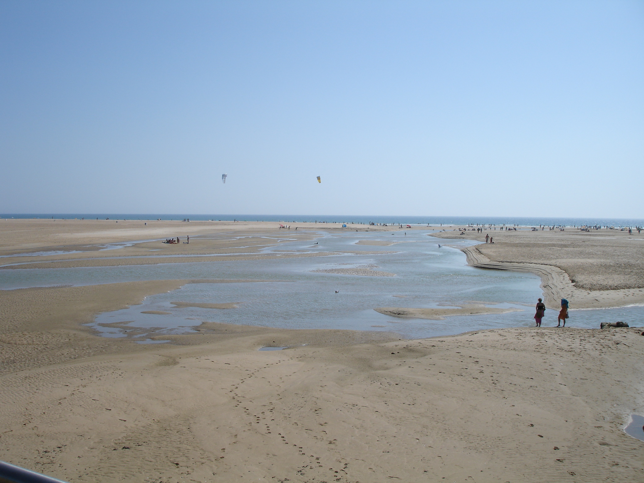 Playa de Conil de la Frontera cruzando el río